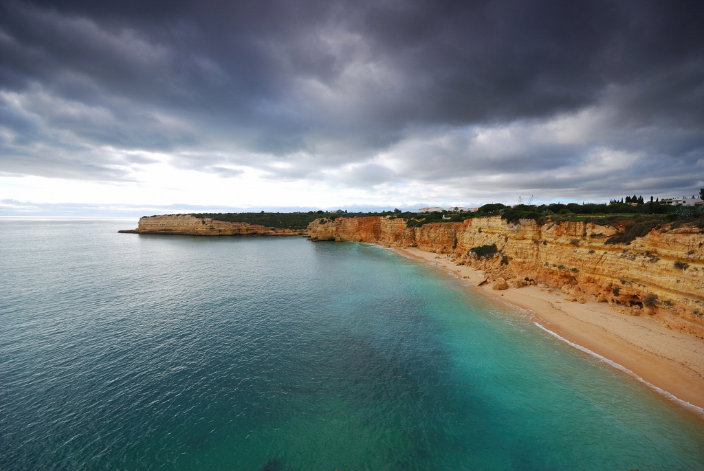 Praia da Nossa Senhora da Rocha em Porches, Algarve, Portugal (Lado oeste da capela)